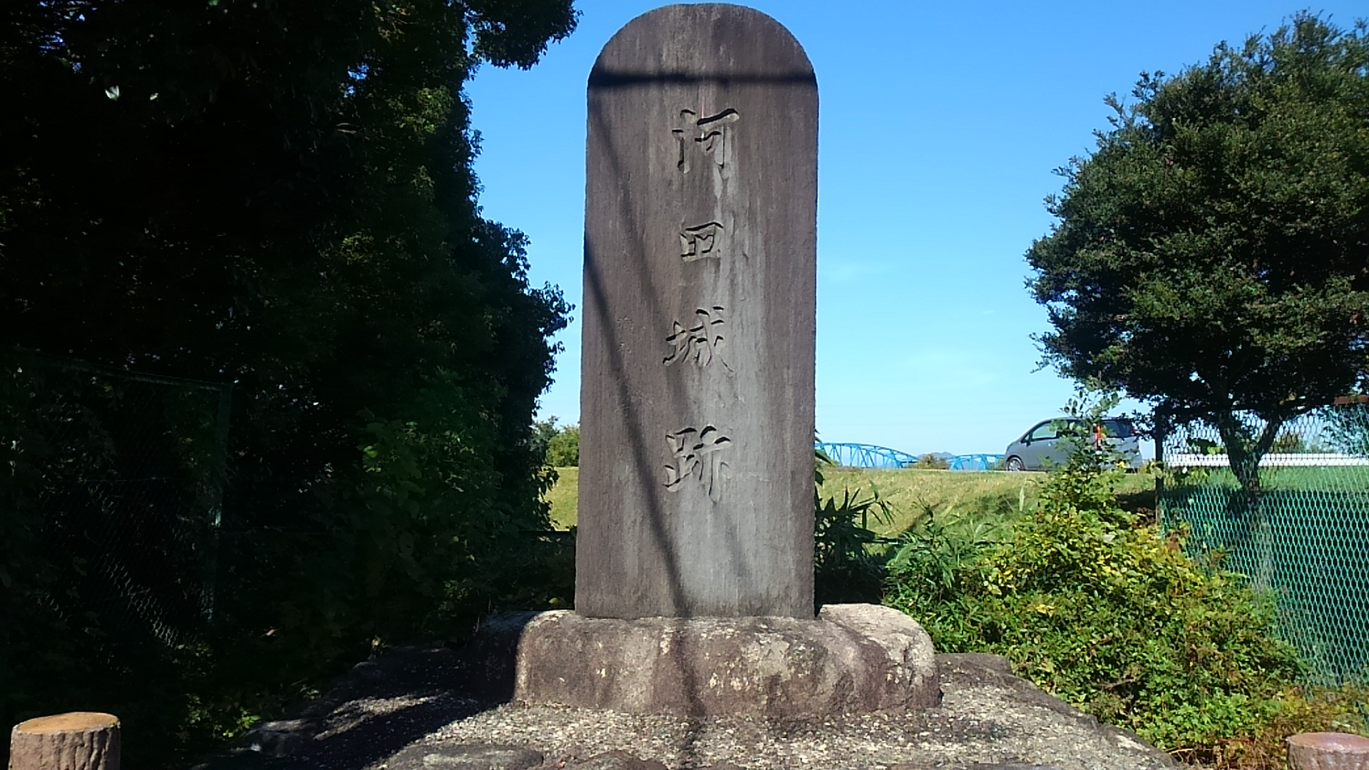 河田城石碑